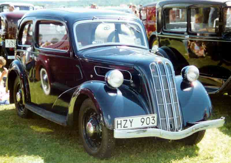 Ford 7W Ten De Luxe Saloon 1938